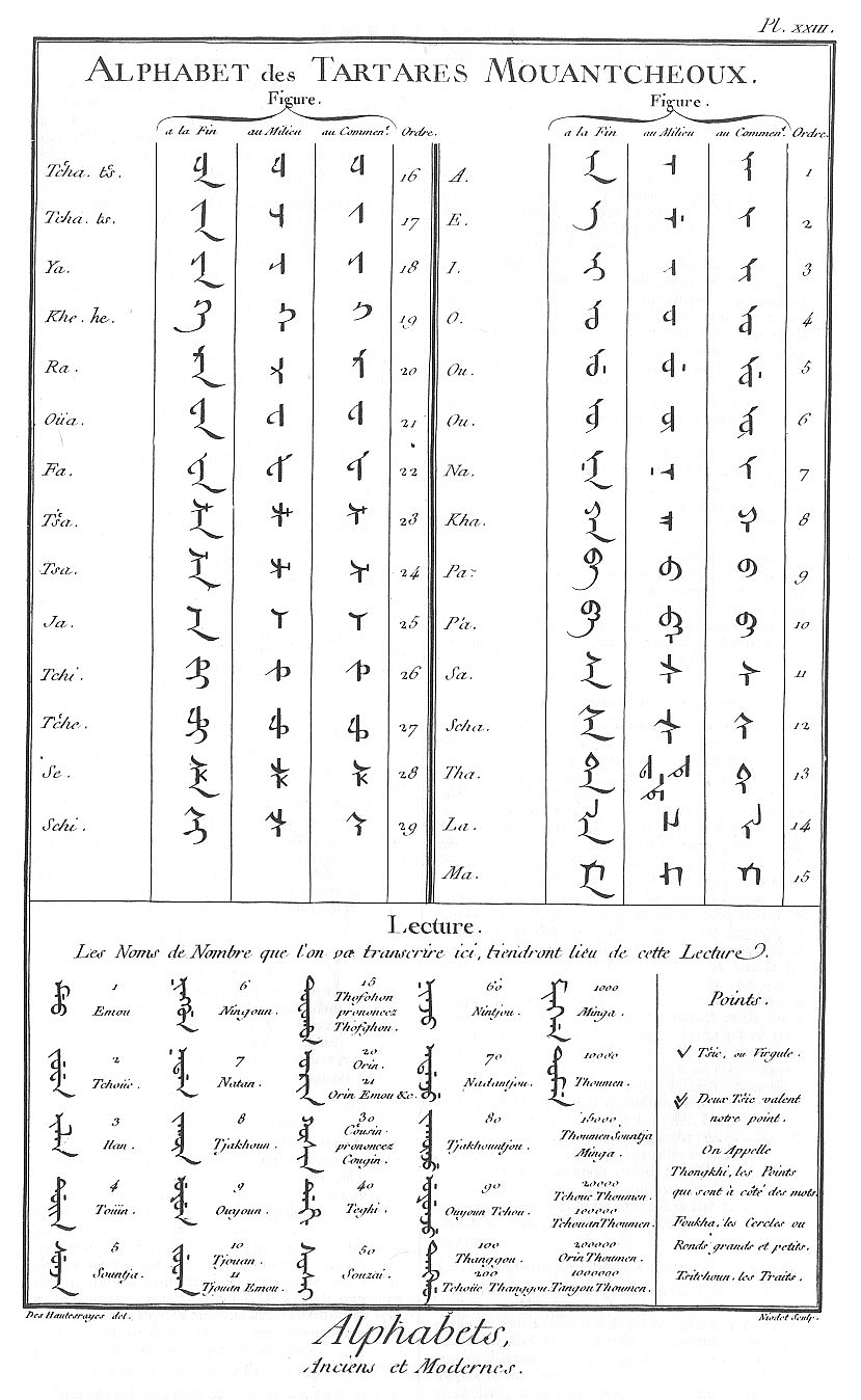 "Alphabet des Tartares Mouantcheoux". Manchu alphabet. Plate designed by French orientalist Michel-Ange-André Le Roux Deshauterayes (1724-1795).